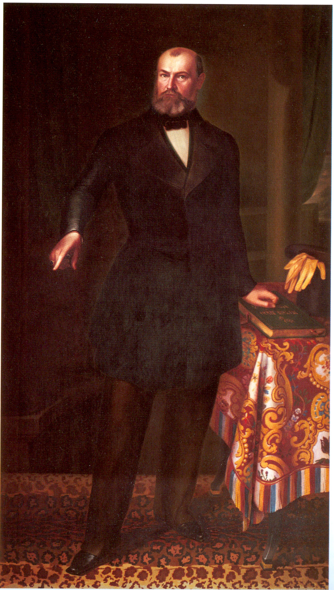 Fürst Constantin von Waldburg-Zeil-Trauchburg (1807 – 1862) Mit Reichsverfassung von 1849 mit schwarz-rot-goldenem Lesezeichen